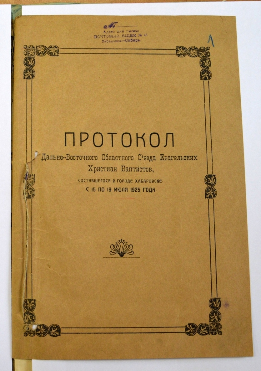 Протокол съезда Дальневосточного союза баптистов 1925